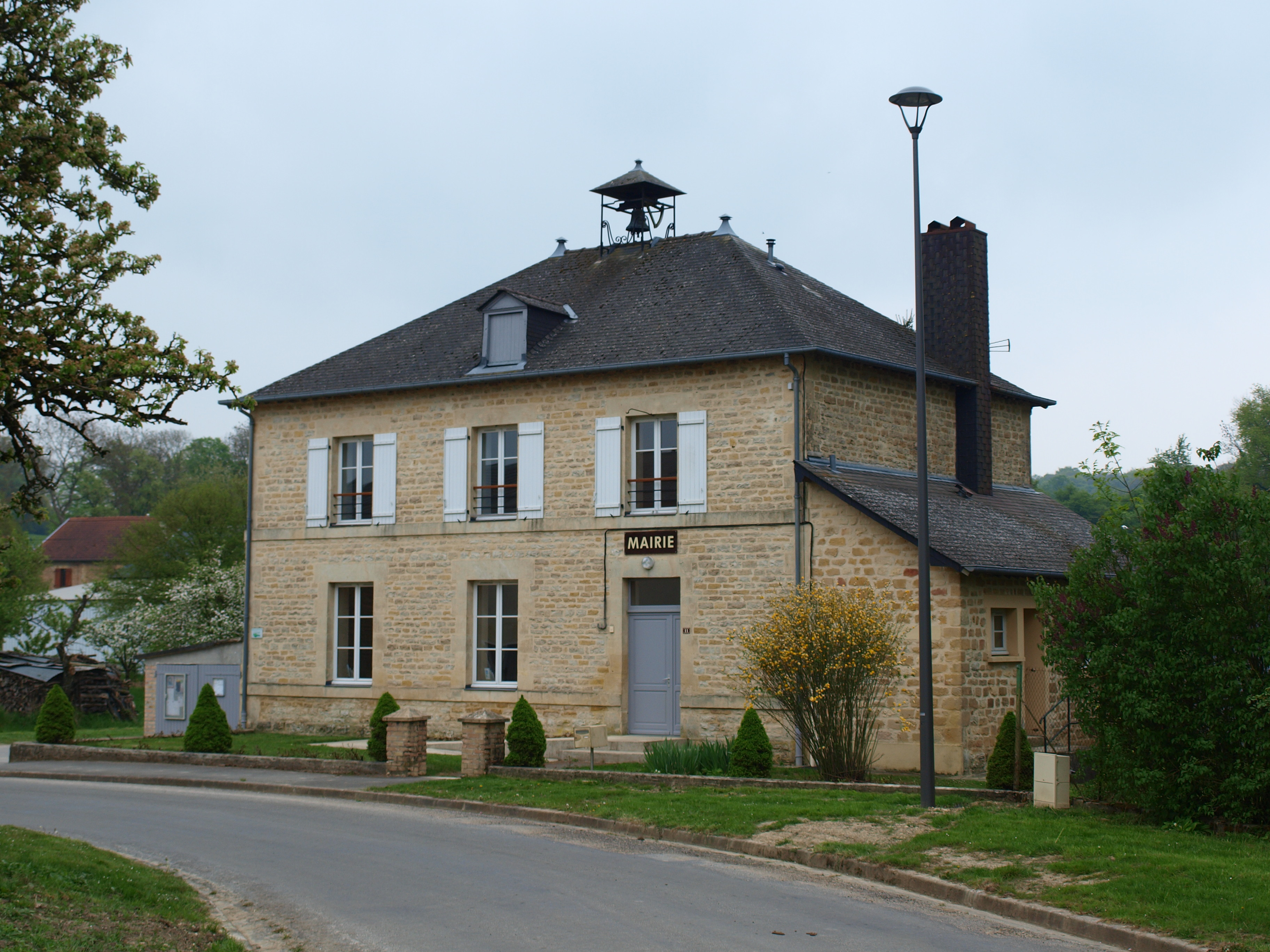 Lametz (Ardennes, France) ; mairie